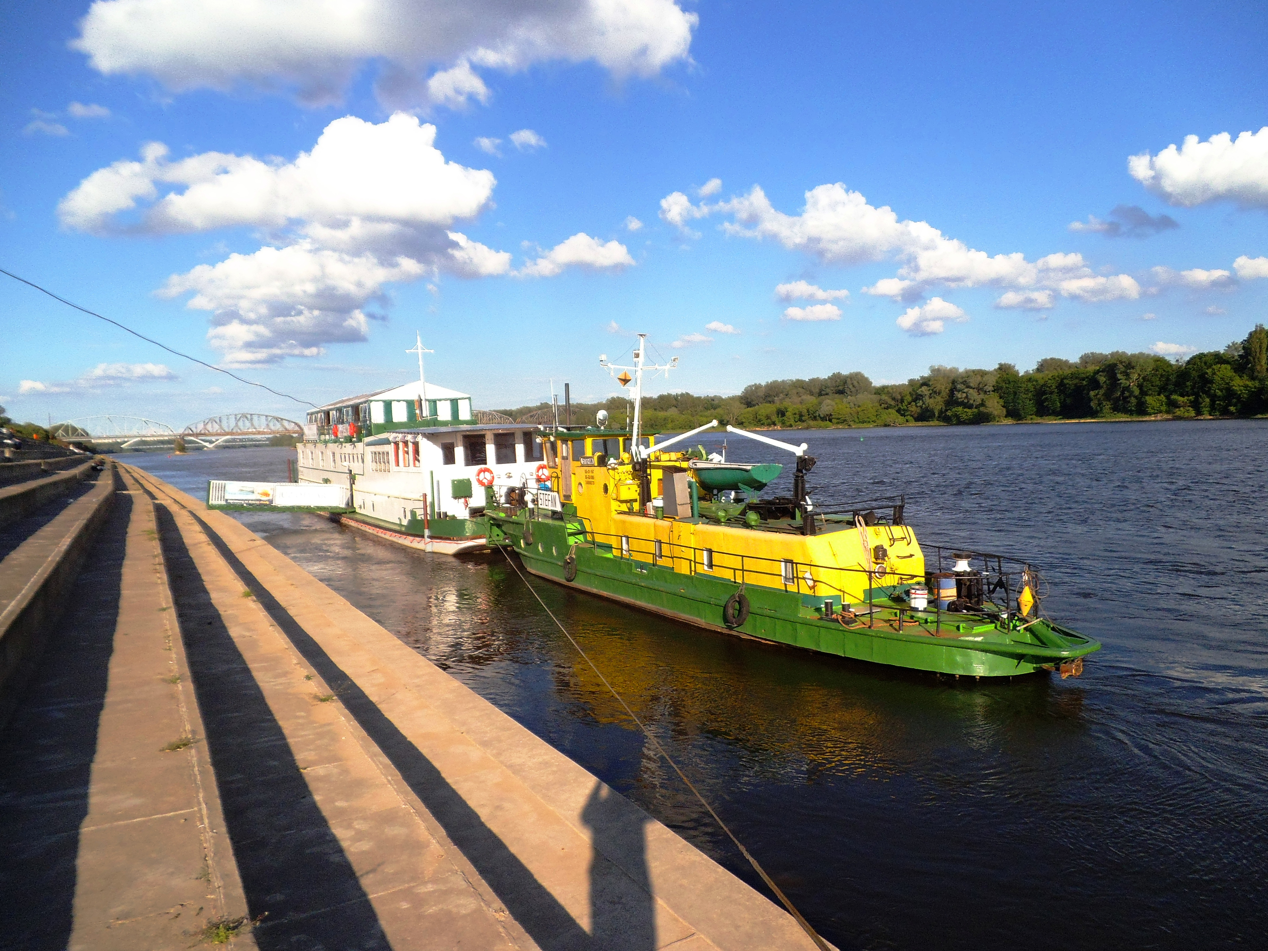 Bulwar Filadelfijski w Toruniu22